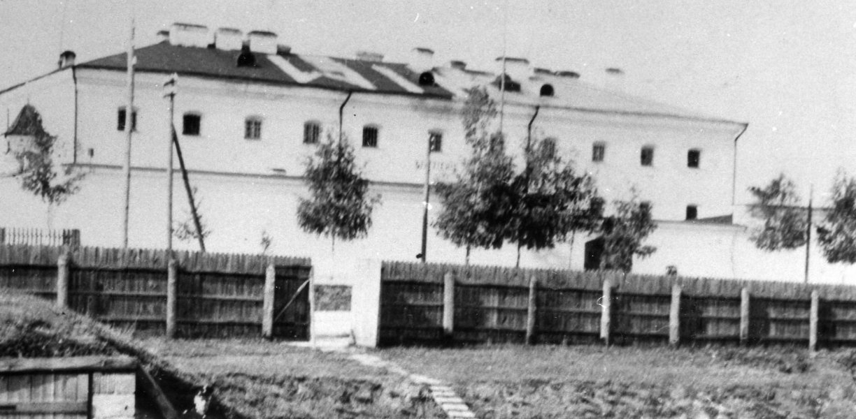 Беларуская (тарашкевіца): Вялейка (Vialejka), вуліца Нароцкая (vulica Narockaja). Вязьніца